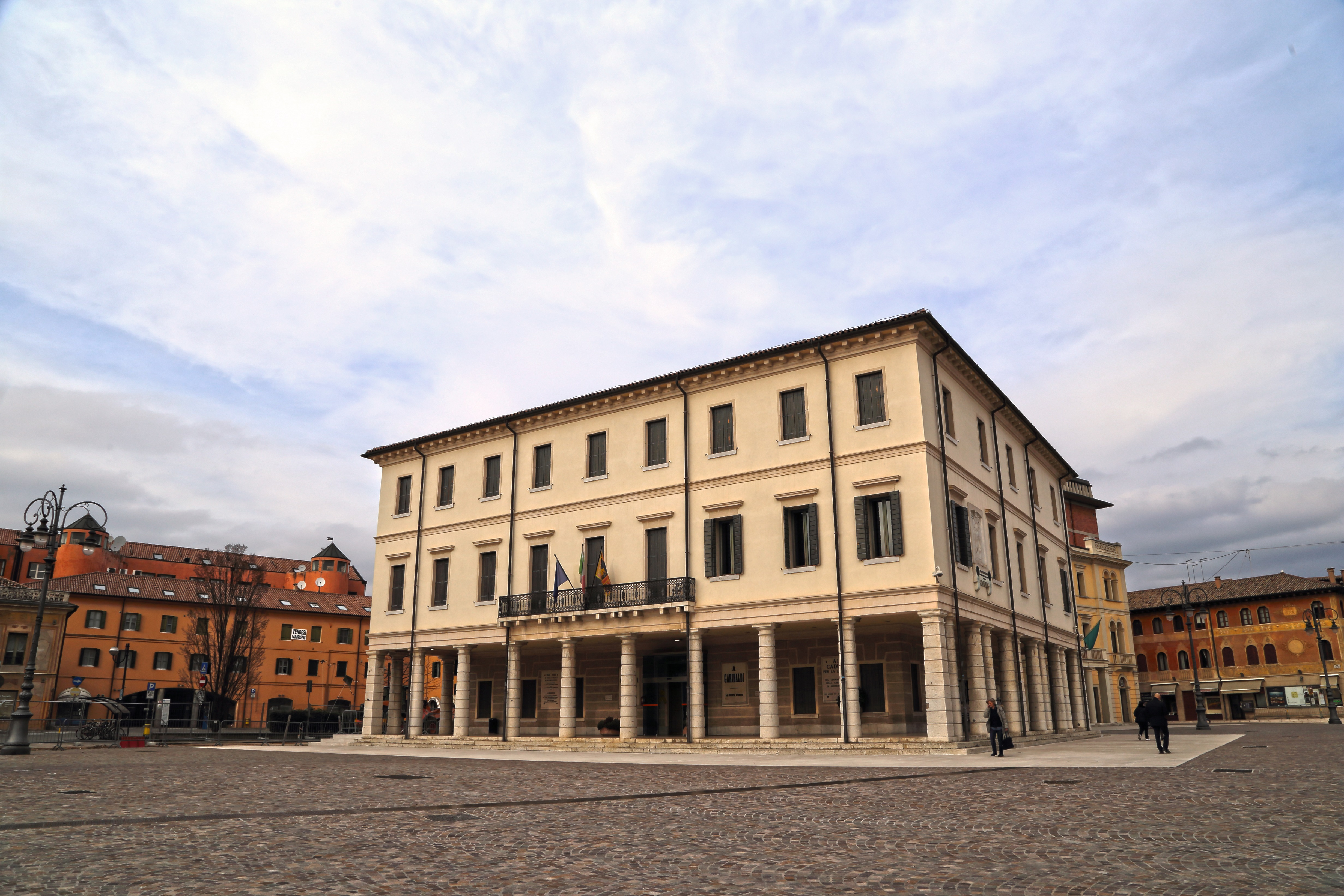 Veduta del municipio di Montebelluna